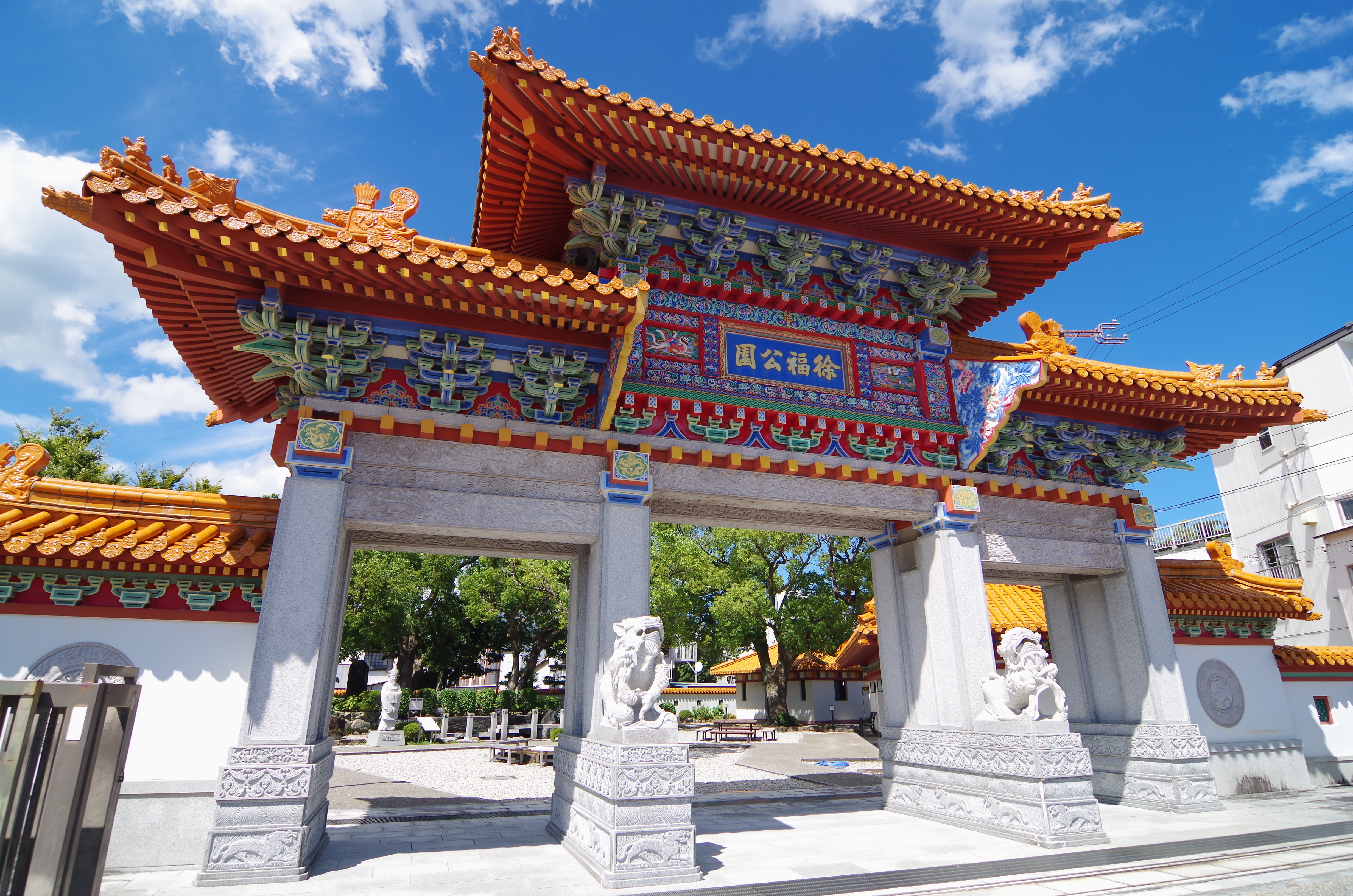 徐福公園 新宮市にて Jofuku Park 2014.8.20